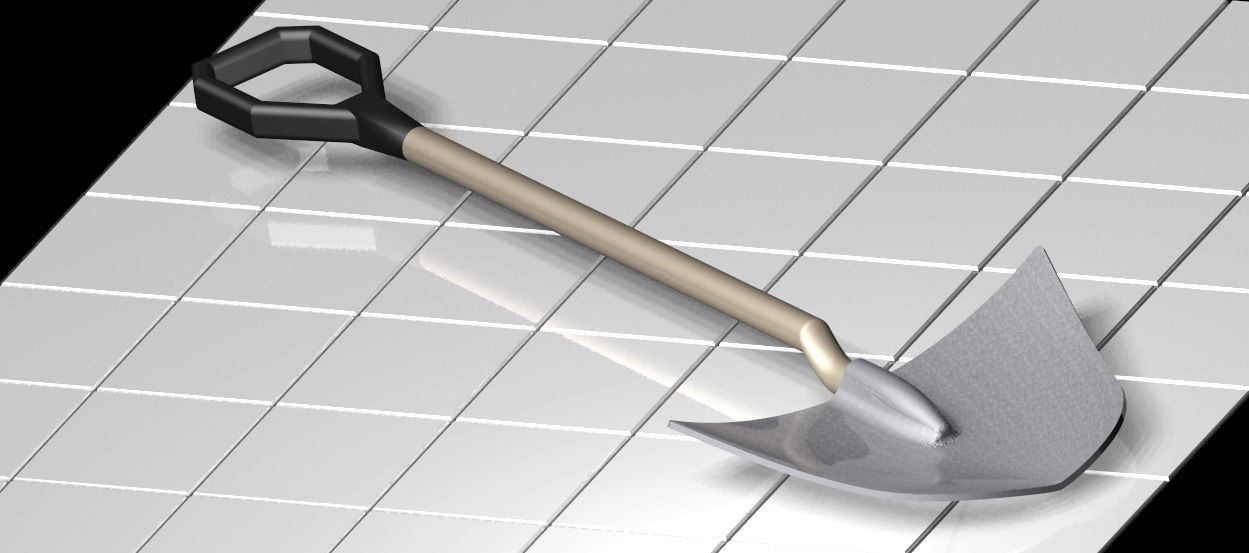 Pá desenhada no Solid Edge